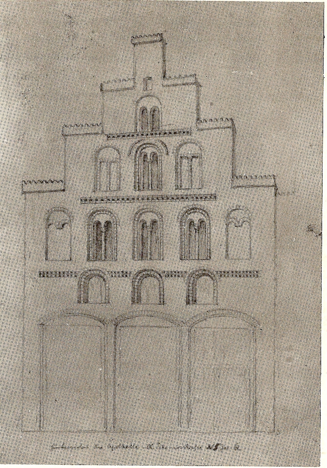 Bleistiftzeichnung des romanischen rückseitigen Giebels / Hintergiebels der Löwenapotheke in Lübeck, gezeichnet von Carl Julius Milde und im Besitz des St.-Annen-Museums in Lübeck befindlich.